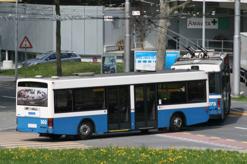 Der NAW/Hess/Siemens BT 5-25 Nr. 273 zieht den Lanz&Marti/Hess APM 5.6-13 Nr. 303 (Anhänger) über eine Kreuzung im Schönbühl